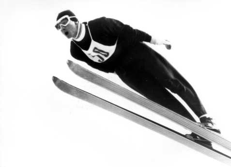 A. Sztolf